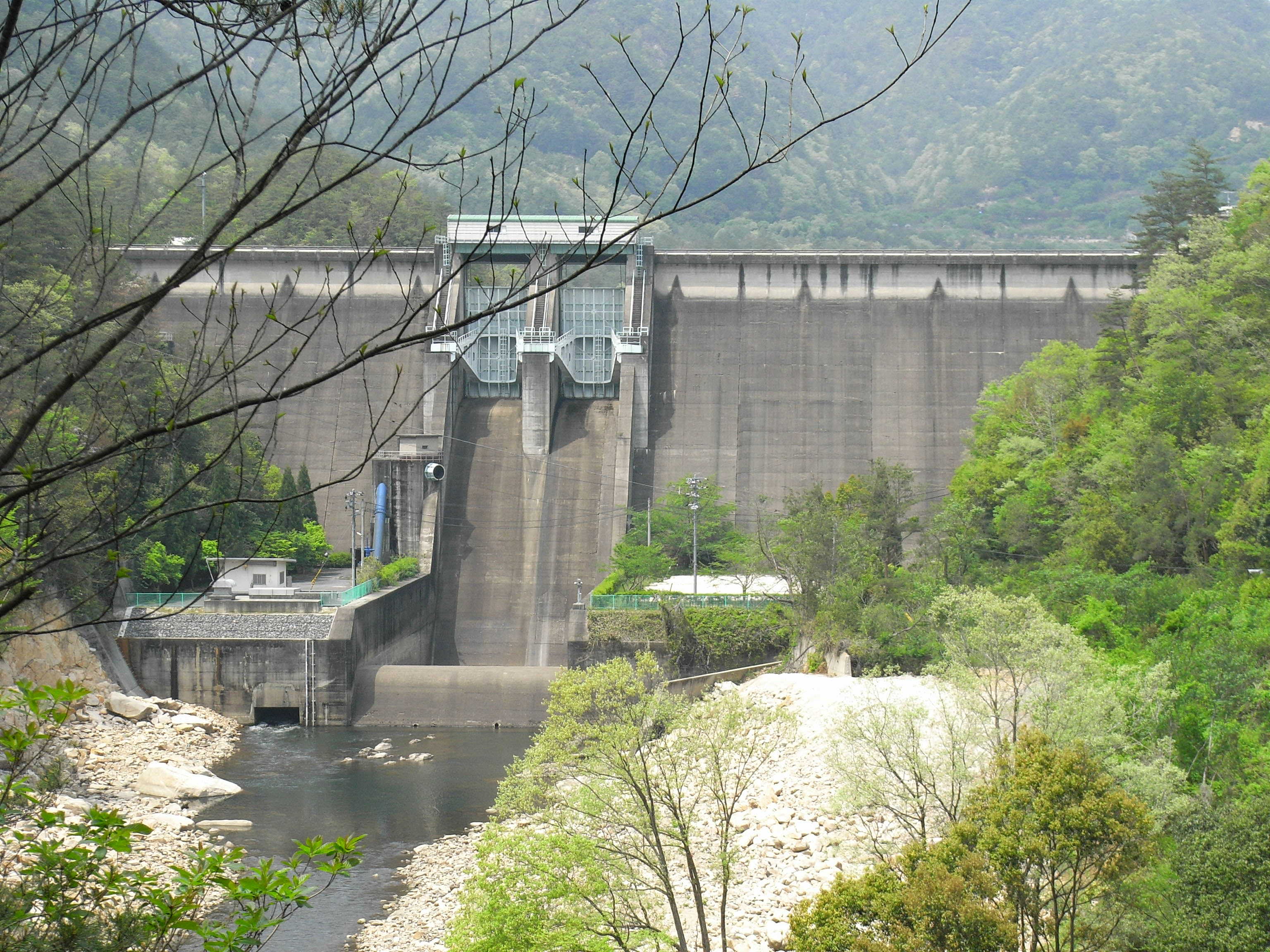 Dam